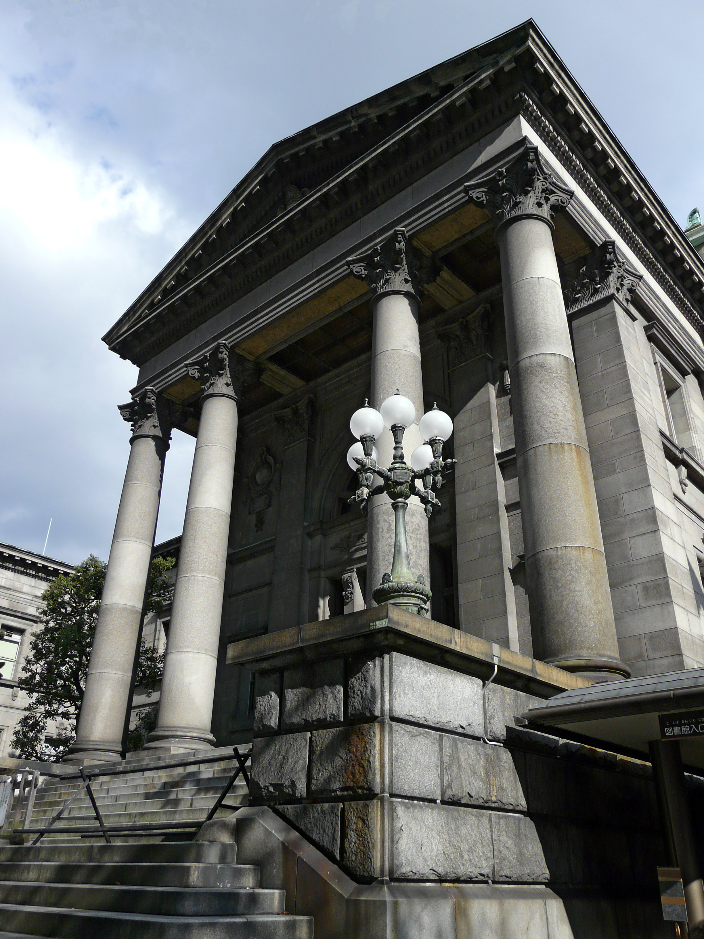 Osaka Prefectural Nakanoshima Library in Osaka, Osaka prefecture, Japan